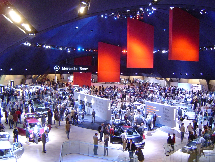 Beschreibung: Mercedes-Benz auf der IAA Quelle: selbst fotografiert Fotograf: O. Stapf "Credibility" Datum: September 2005 Foto: Digitalbild (größere Auflösung vorhanden)